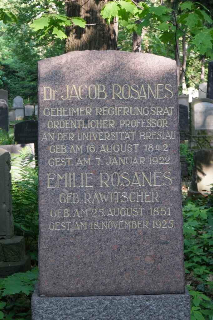 Grab des Mathematikers und Schachmeisters Jacob Rosanes (1842-1922) auf dem Alten Jüdischen Friedhof in Breslau